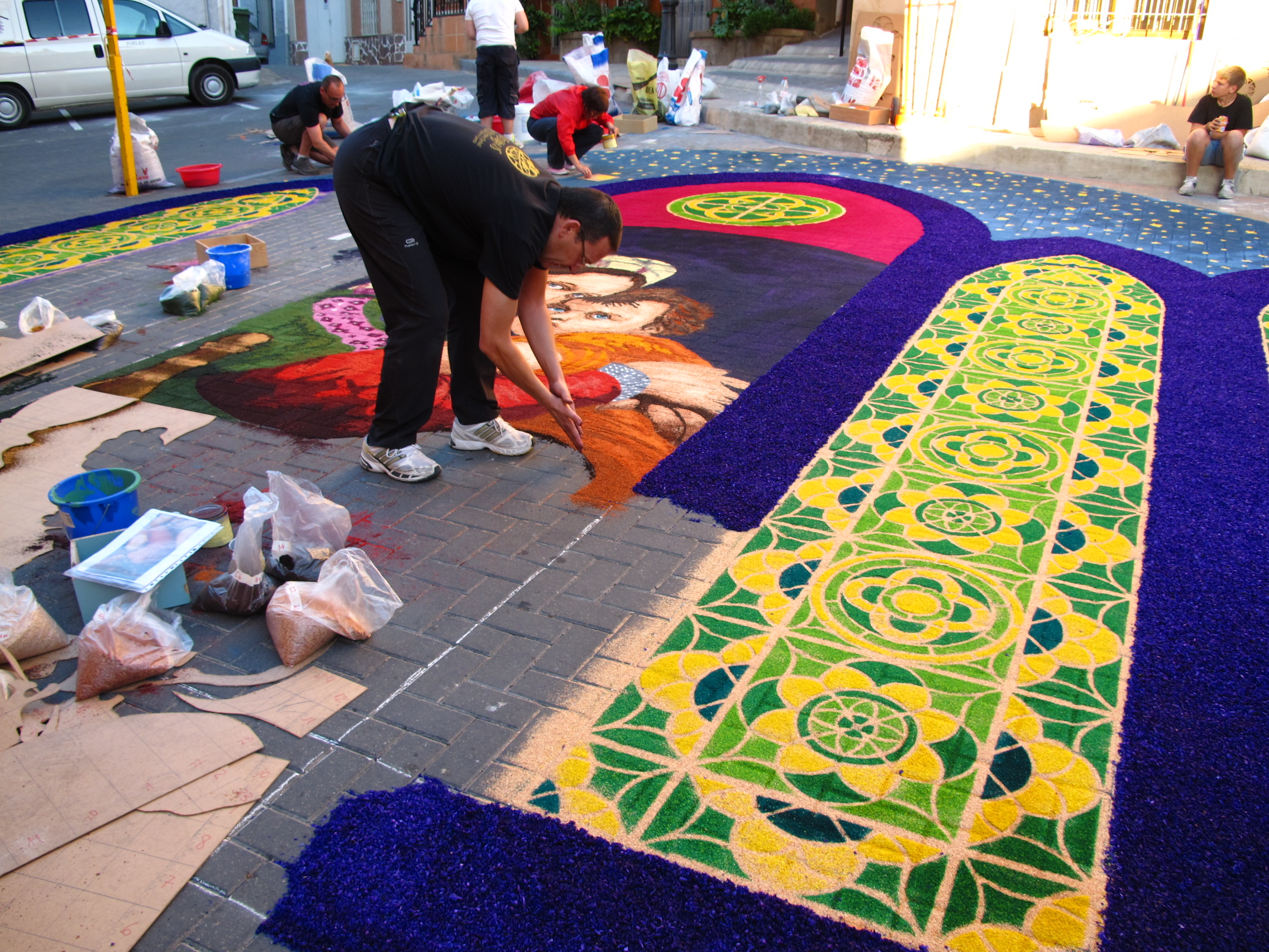 Rezalización de una alfombra de serrín